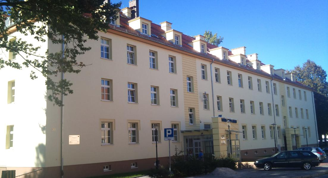 Budynek Wyższej Szkoły Biznesu w Gorzowie Wlkp.